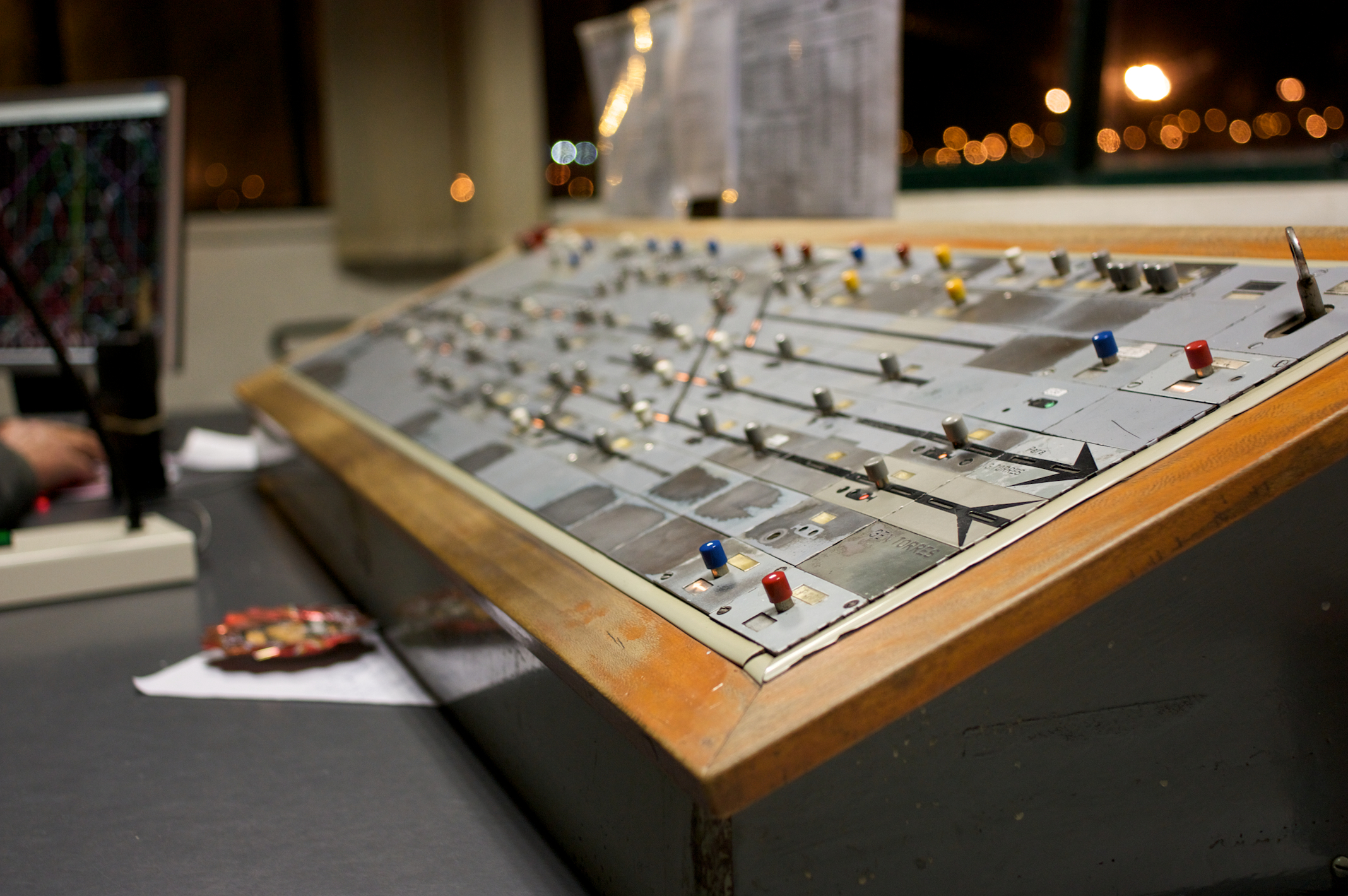 pormenor da mesa de comando local. Tipo: E Estação Local: Vila Nova de Gaia Linha do Norte, PK 332 Data e hora: 18 de Dezembro de 2009 20h33